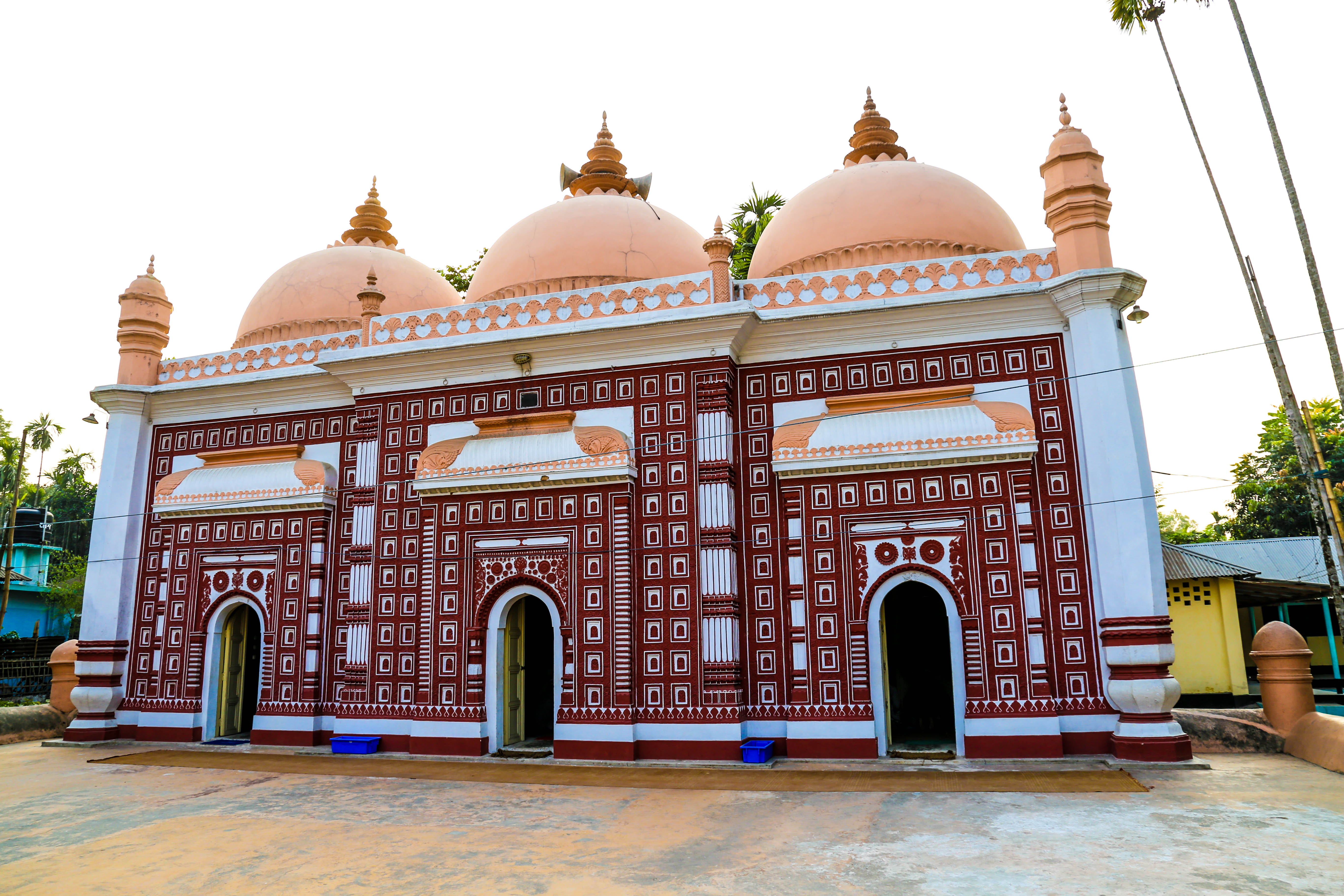 তিনটি দরজাতেই ছাদ ও দরজার উপরিভাগের মাঝামাঝি স্থানে বাইরের দিকে উভয় পাশে ঢালু তোরণাকৃতির অংশ সংযুক্ত হওয়ায় অলংঙ্করণে যুক্ত হয়েছে নান্দনিকতা।